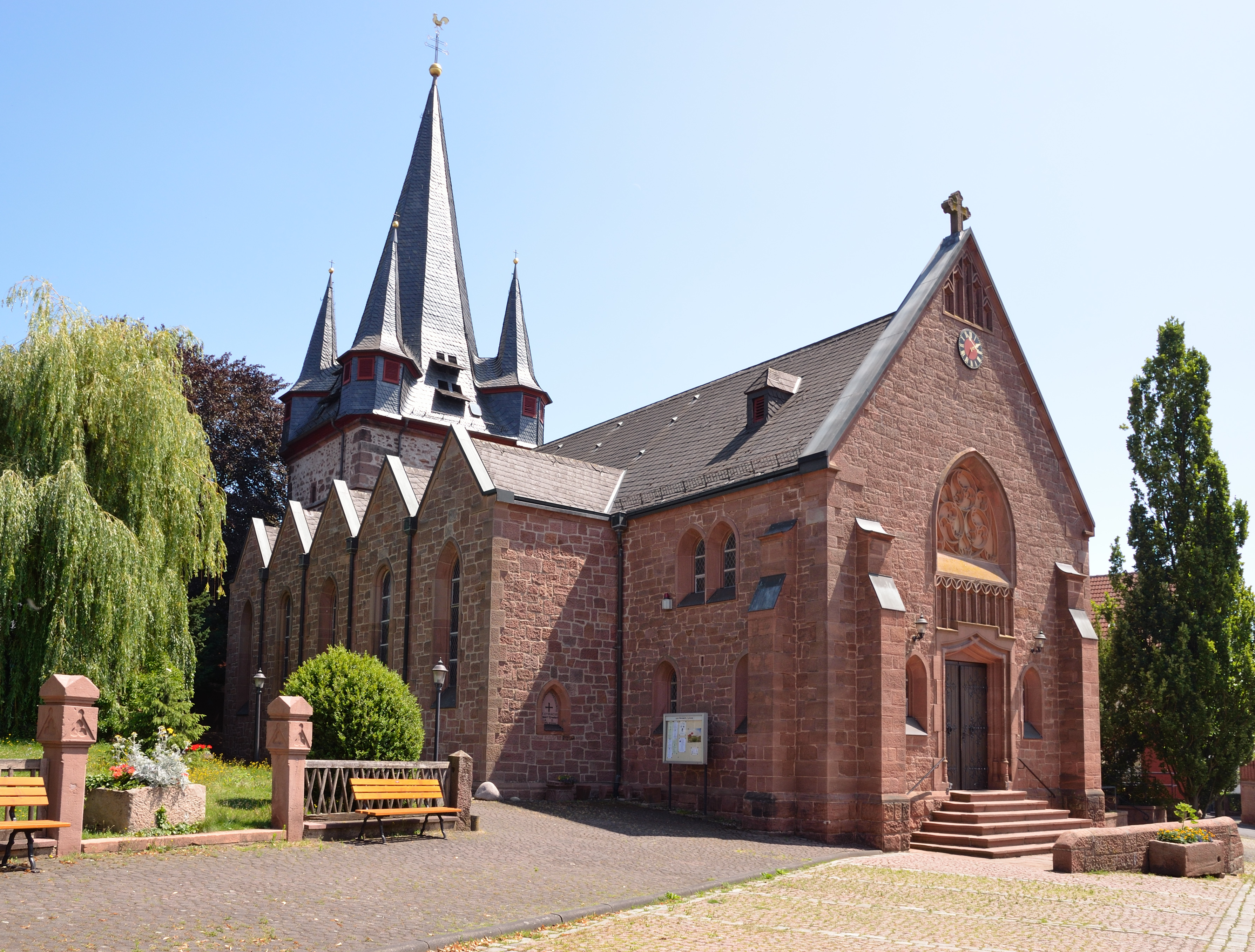 Die Pfarrkirche St.-Cyriakus in Marburg-Bauerbach